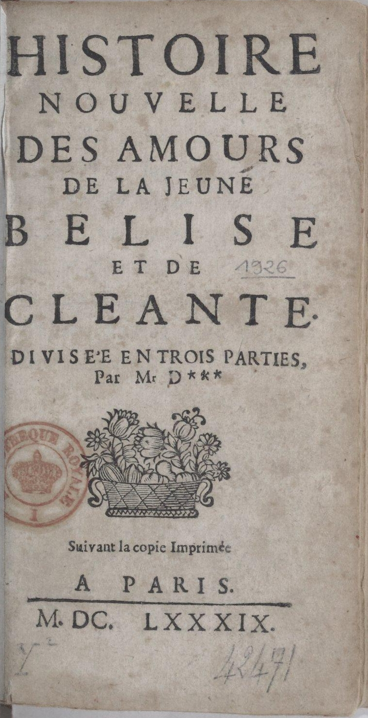 Histoire nouvelle des amours de la jeune Belise et de Cléante, par Mr D*** [Mme Anne Ferrand] 1689 In-12, 168 p.